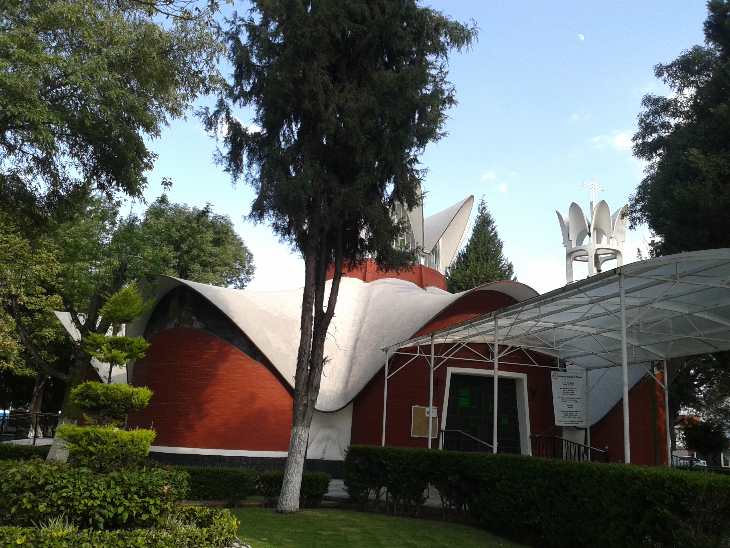 La iglesia y ahora parroquia cuenta con una torre de campanario y se ubica en el medio de una glorieta. Construida hacia 1966.